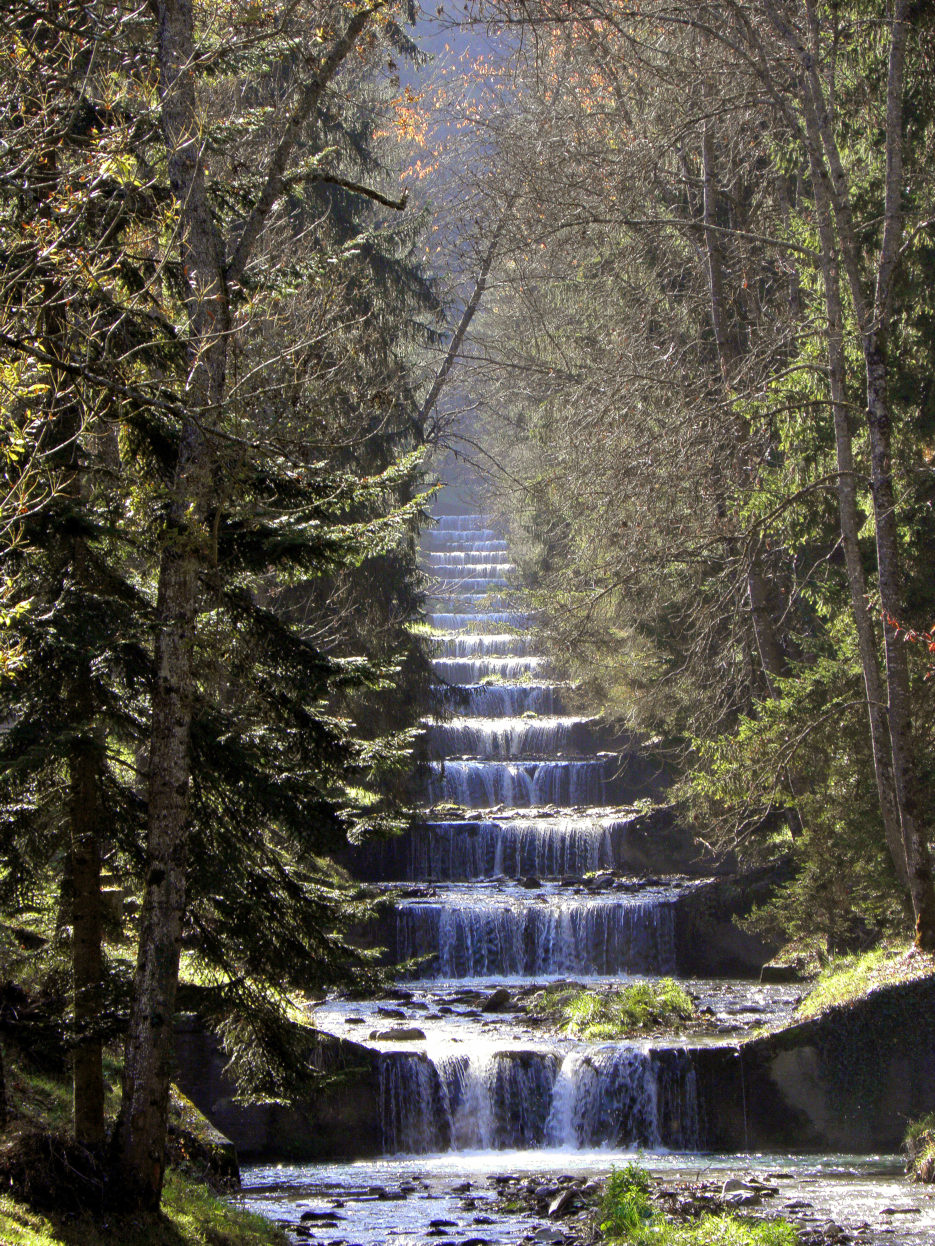 Le Morel (Aigueblanche, Savoie). Partie aménagée en aval de la cascade du Morel. Prise de vue en Automne